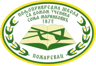 грб школе